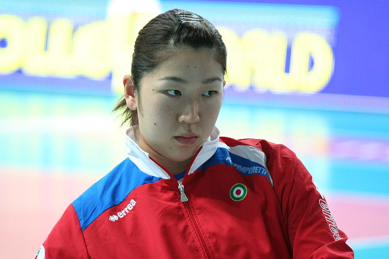 Foto di Erika Araki